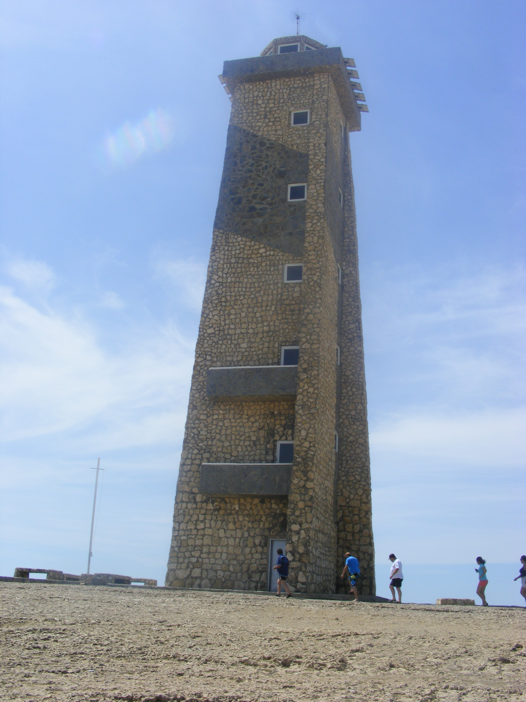 Estado Falcón